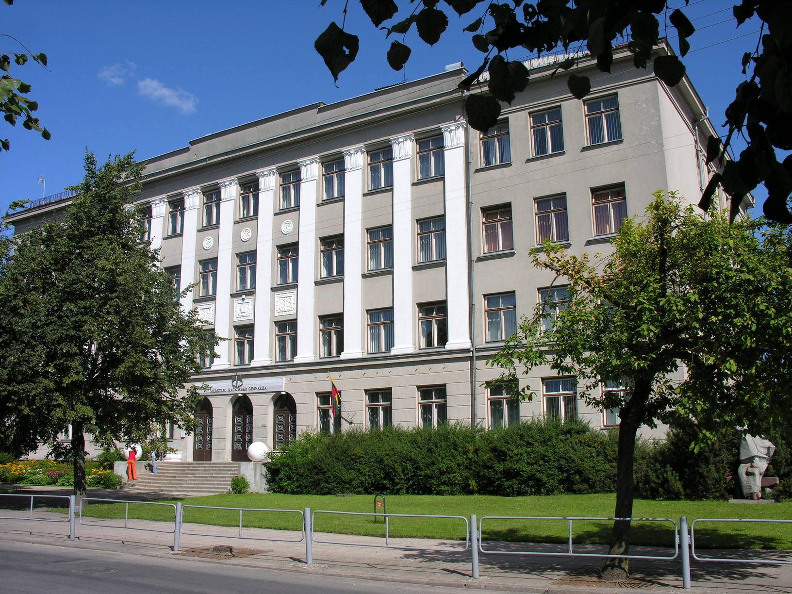 Mažeikių M.Račkausko gimnazija Foto Algirdas, 2005 m. rugsėjo 2 d.